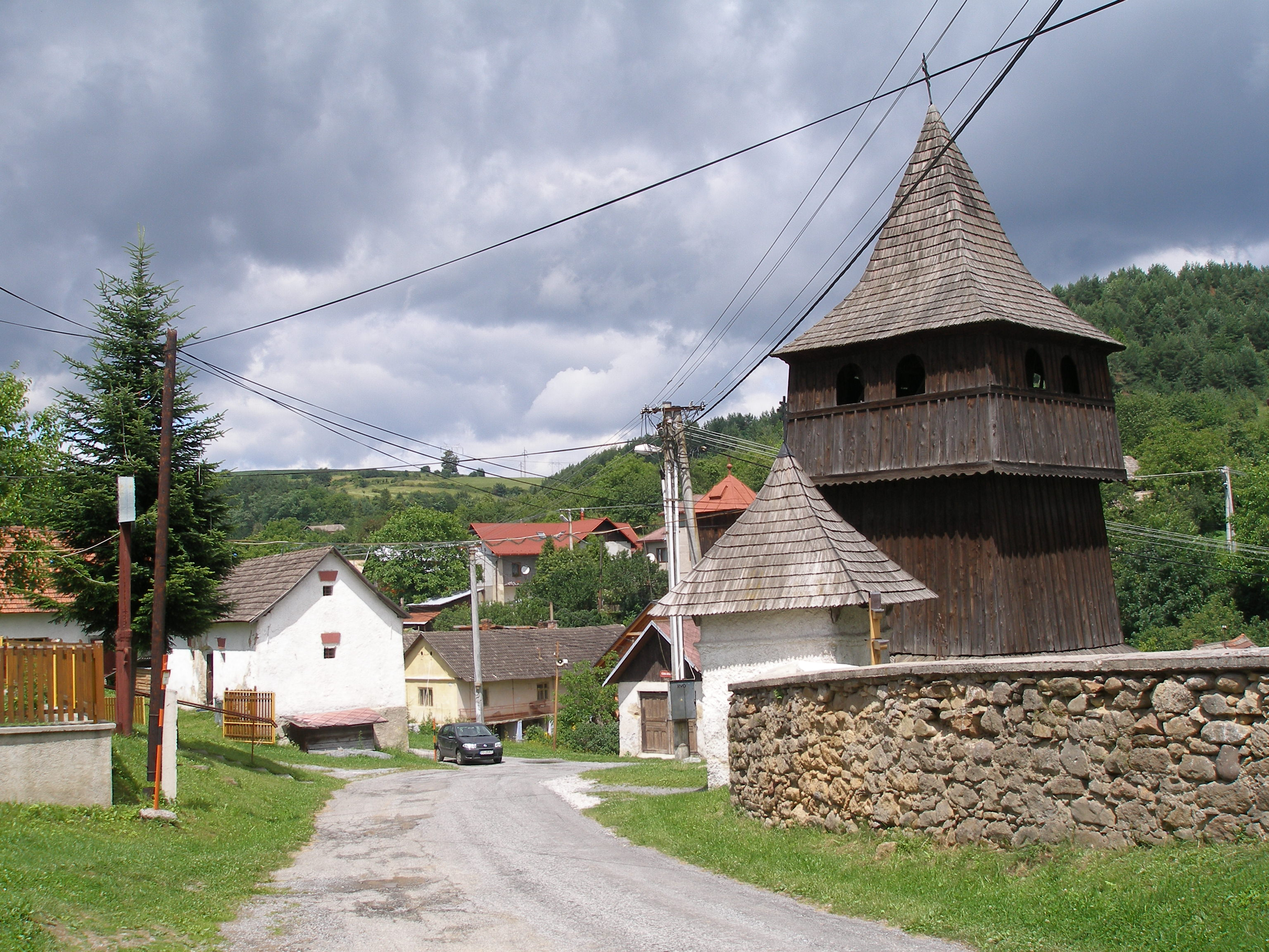 Klenov obec v Šarišskej vrchovine, okr.Prešov, región Šariš